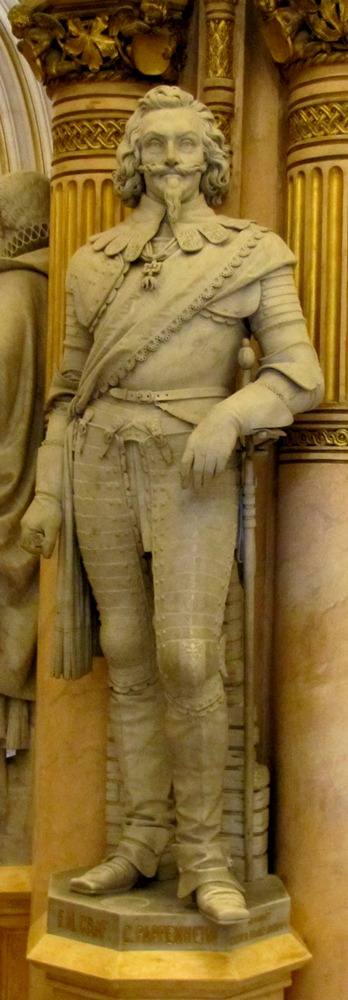 Statue des Grafen Gottfried Heinrich zu Pappenheim in der Feldherrenhalle des Heeresgeschichtlichen Museums in Wien.